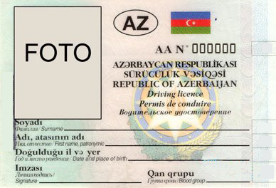 Sürücülük vəsiqəsi (ön tərəfi)